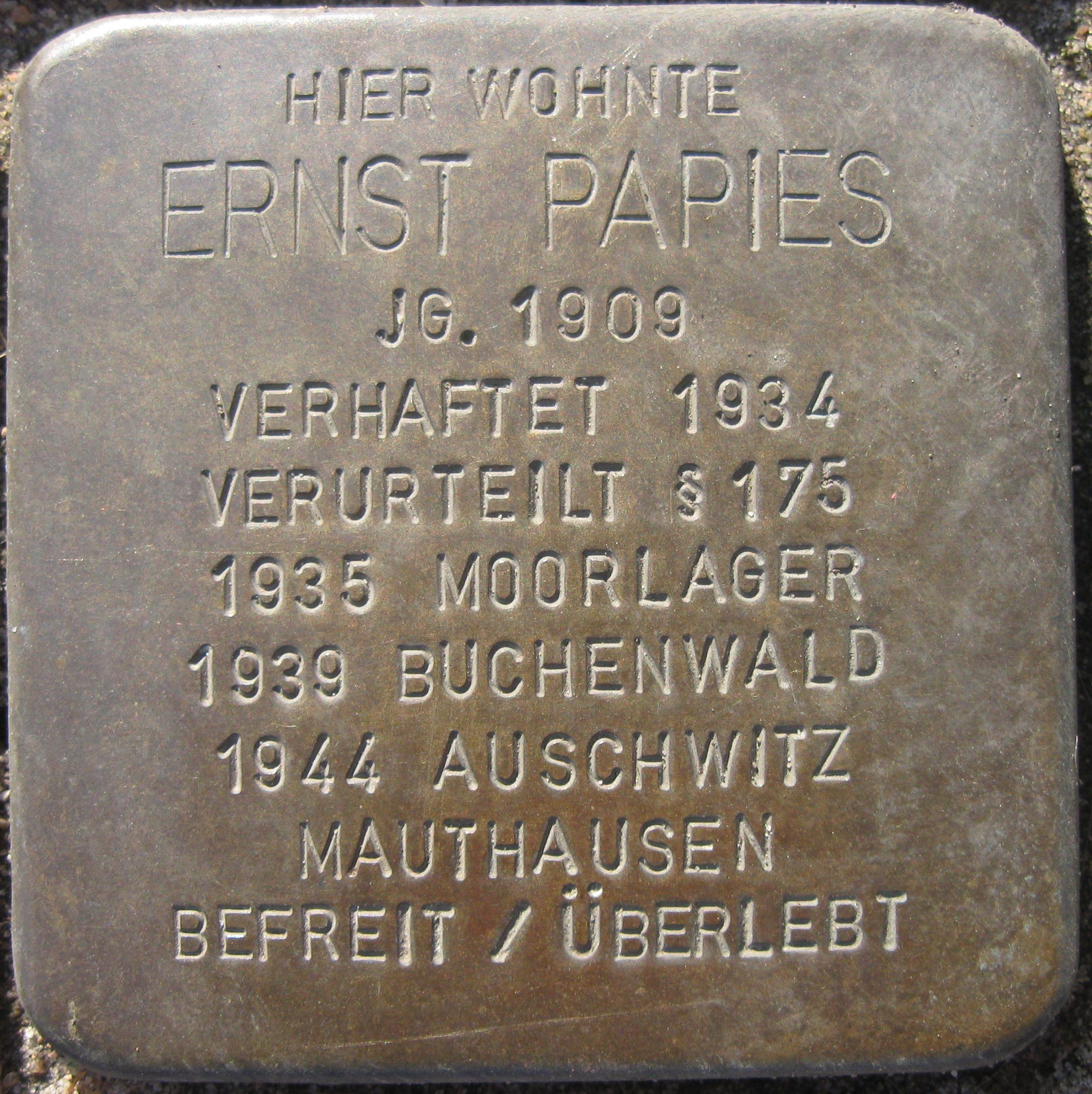 Stolperstein in Gelsenkirchen-Erle, Cranger Str. 398, Ernst Papies